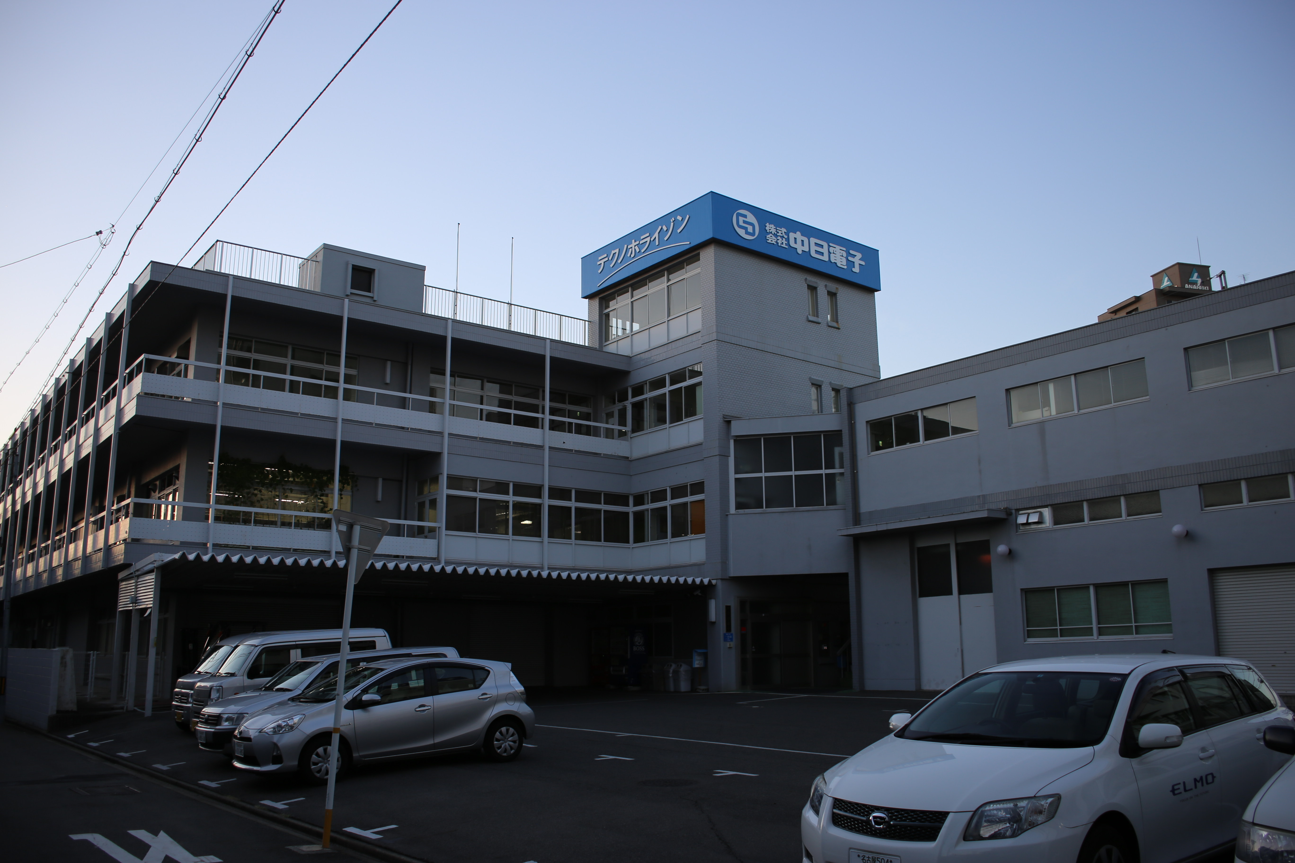 名古屋市瑞穂区明前町の中日電子本社を南側公道東側より撮影